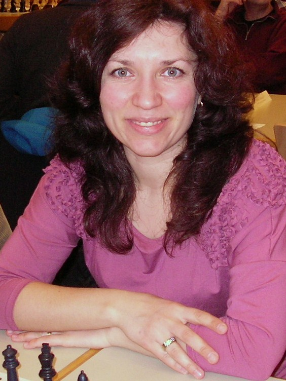 Tatjana Vasilevich, 28. ChessOrg Schachfestival in Bad Wörishofen 2012